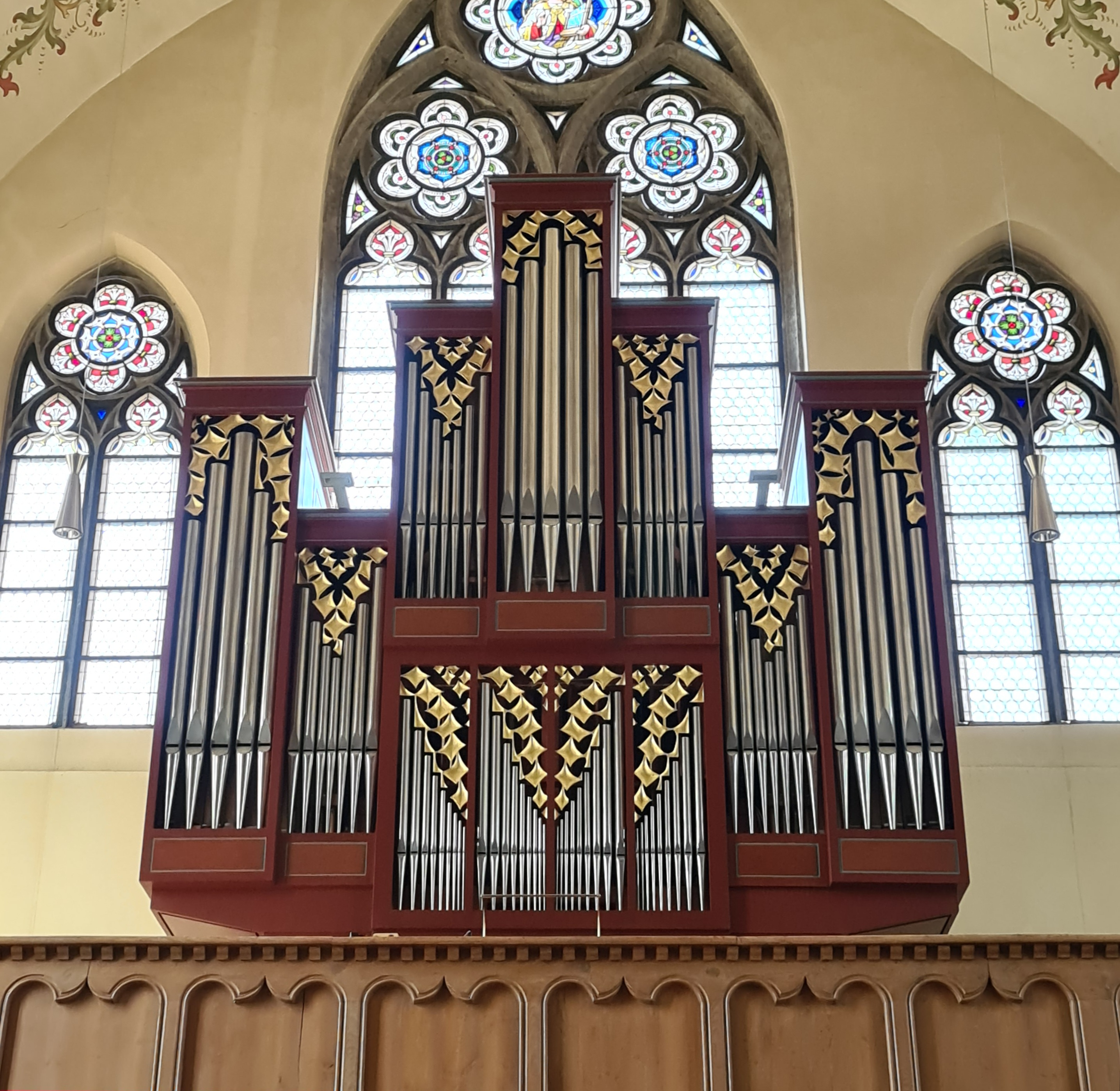 St. Josef (Hohenlinden)